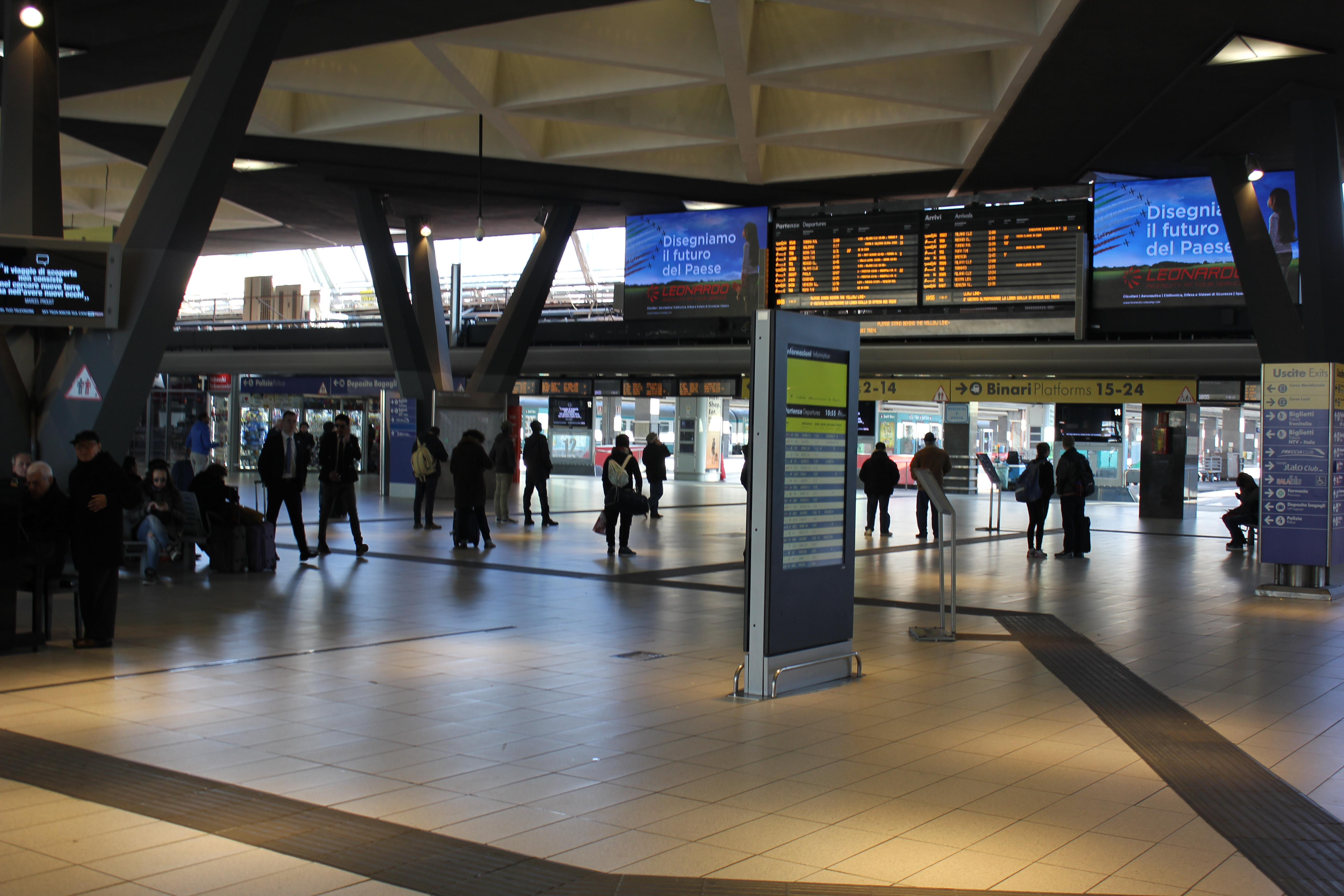 Cette photo montre le hall de la gare des trains de Naples-Centrale, située à la Place Giuseppe Garibaldi